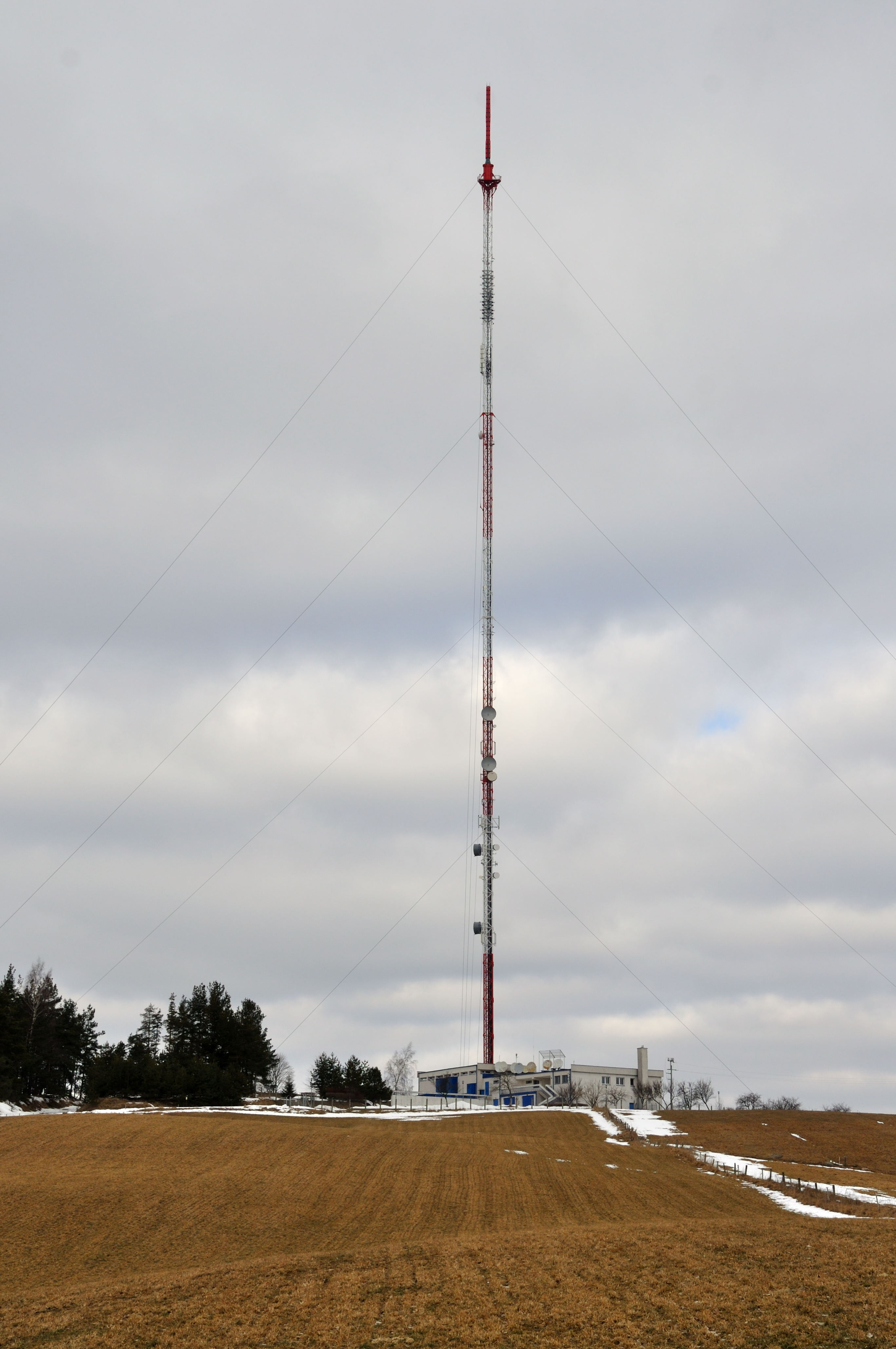 RTCN Krzemianucha, k. Suwałk